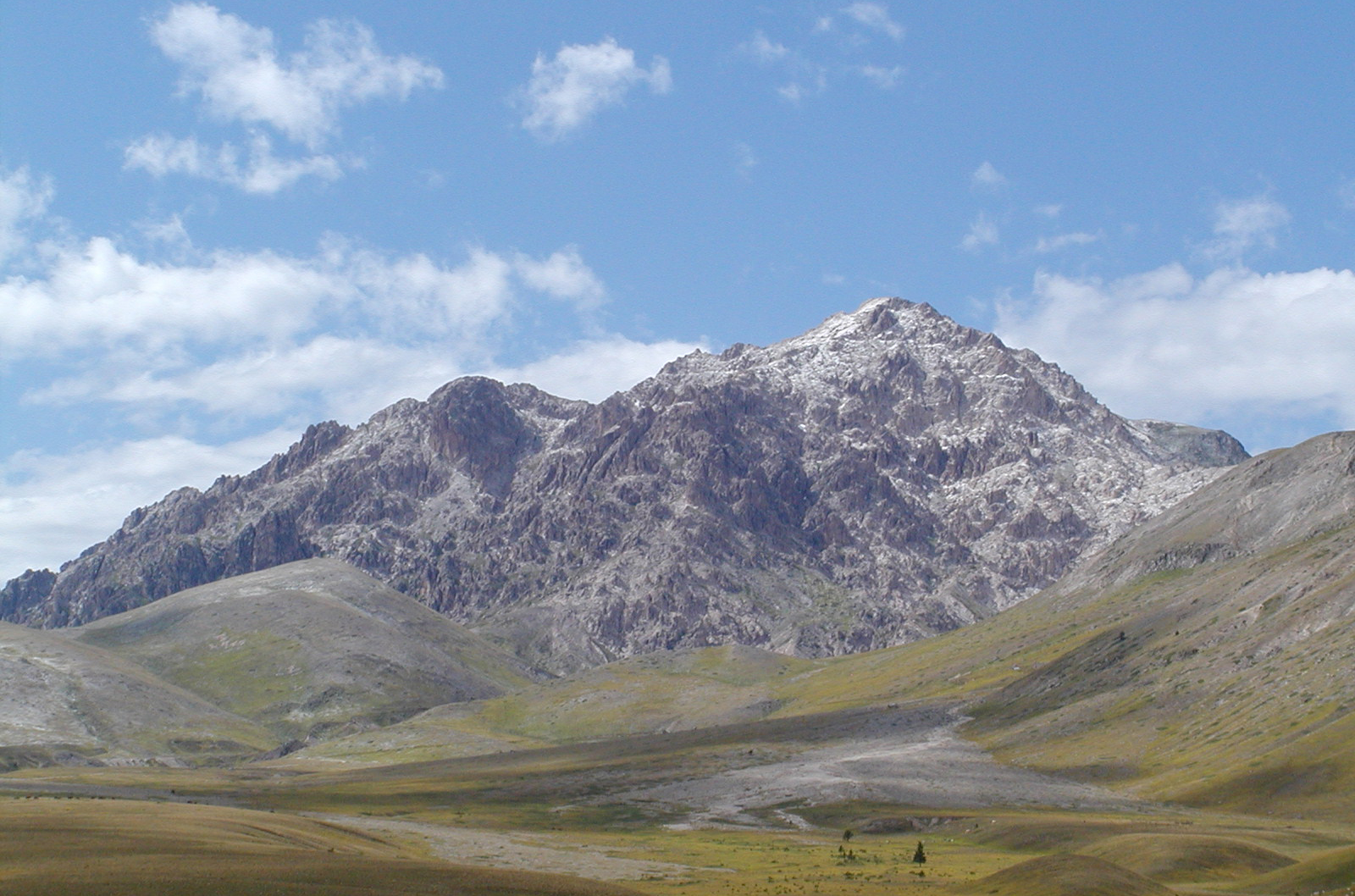 Grand Sasso d'Italia dalla Piana di Campo Imperatore